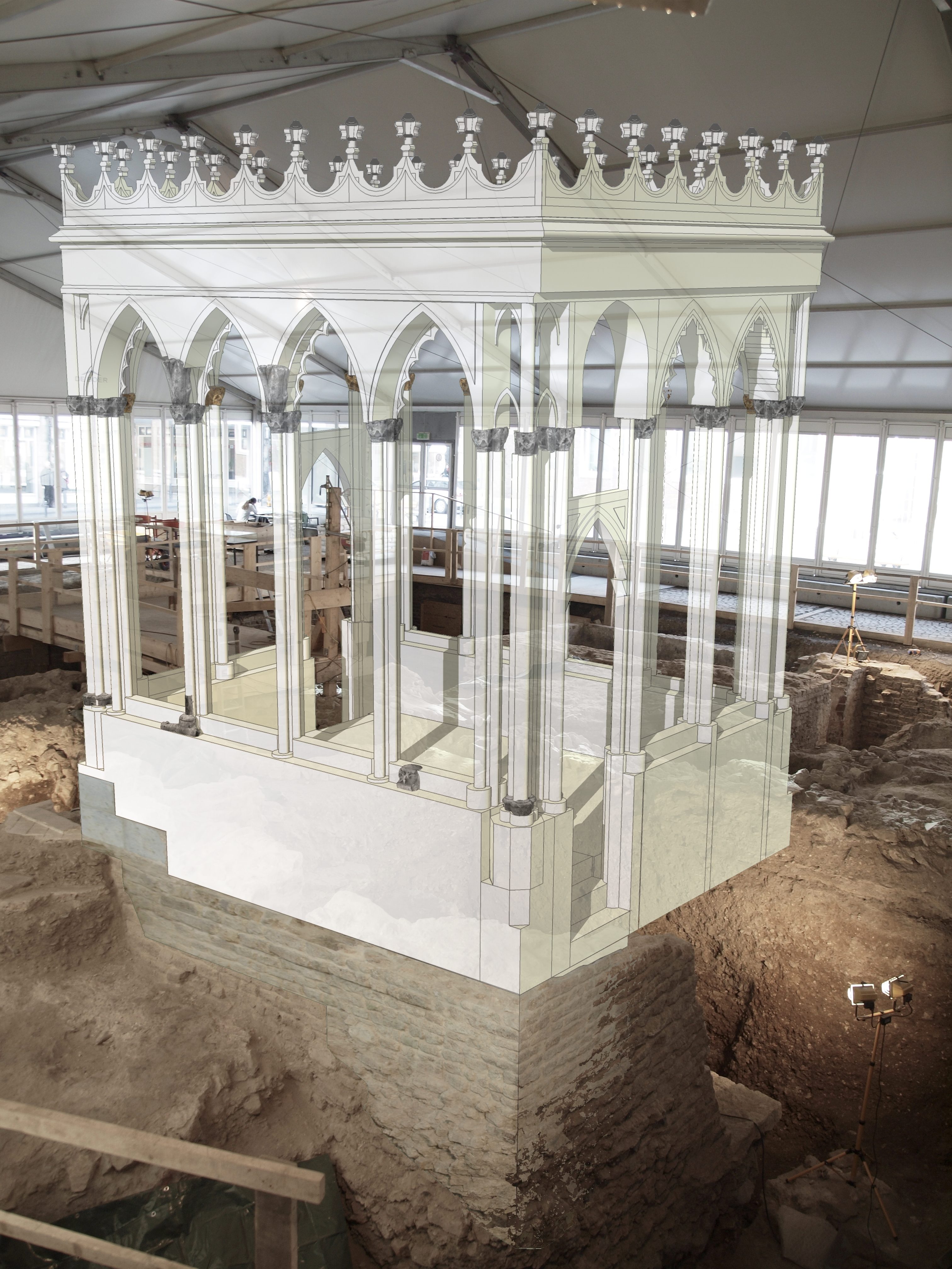 das Modell der gotischen Bimah